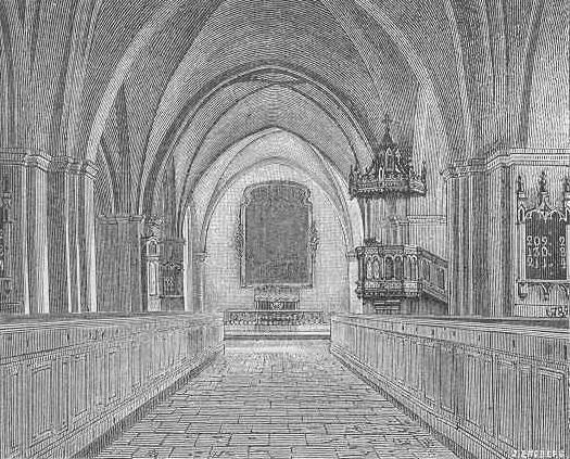 Interiörbild från Växjö domkyrka. Avbildning i "Sveriges historia III", skriven av Oskar Alin, tryckt i Stockholm 1889, sidan 192.